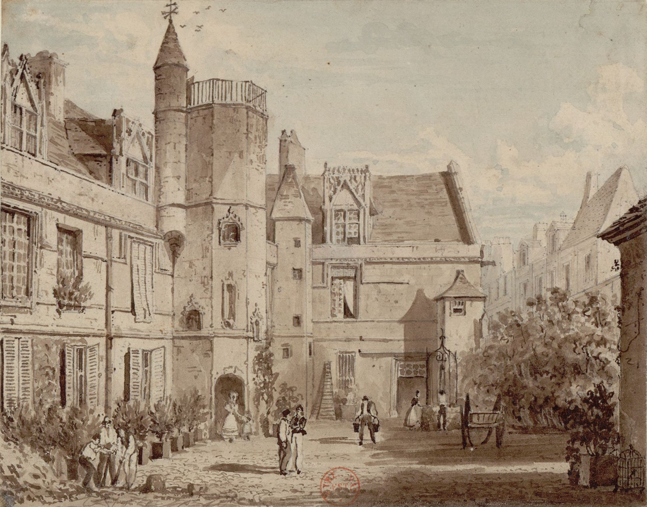 Rue Du Sommerard et hôtel de Cluny, Paris, 1829. Dessin à la plume et lavis à l'encre brune, rehauts d'aquarelle, 11,4 x 14,2 cm, en provenance de la collection Hippolyte Destailleur.